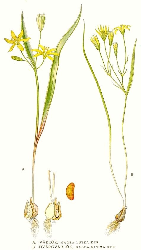 A. Gagea lutea (L.) Ker Gawl. B. Gagea minima (L.) Ker Gawl. Original Description A. Vårlök, Gagea lutea Ker. B. Dvärgvårlök, Gagea minima Ker.